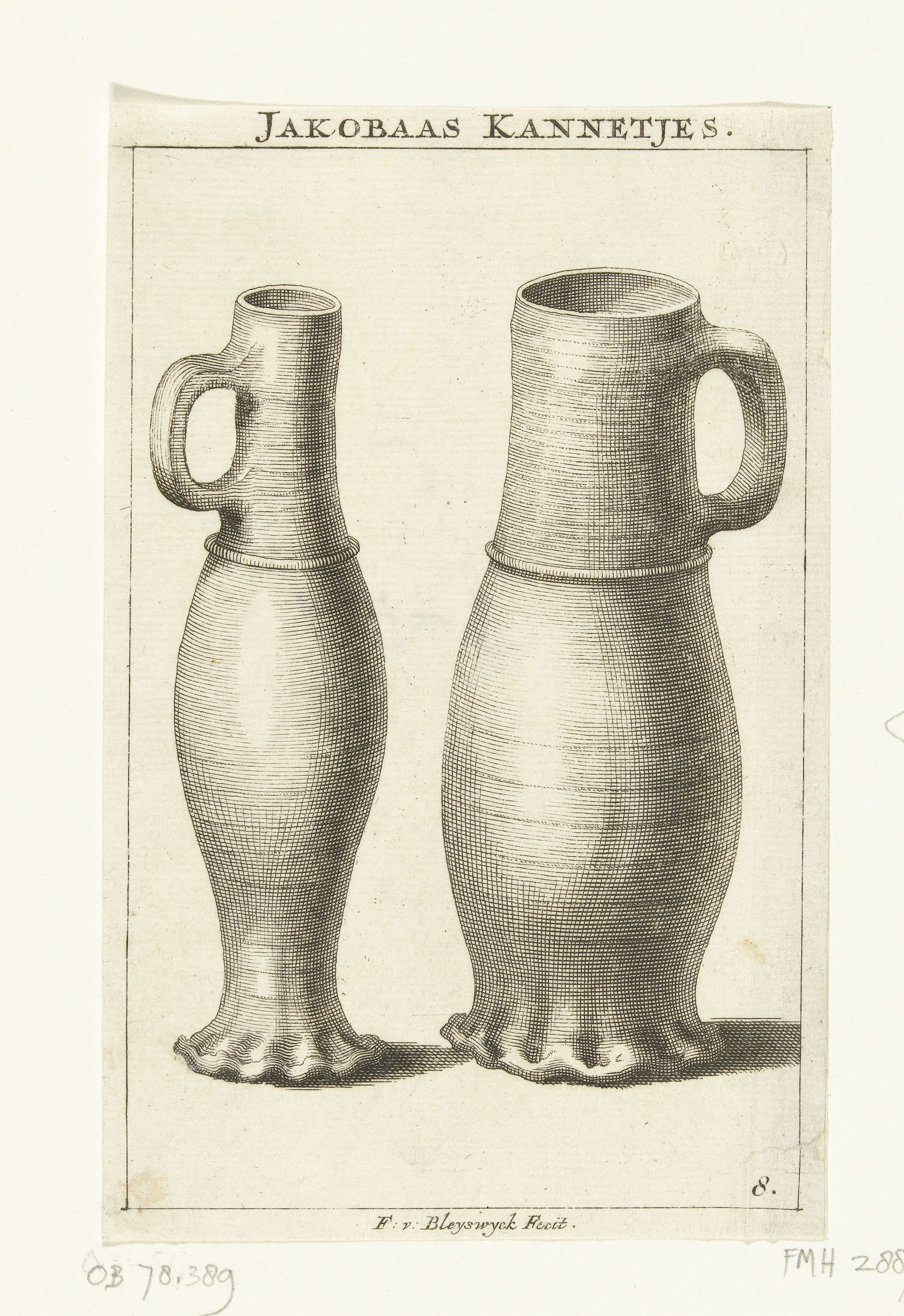 IdentificatieTitel(s): Twee JacobakannenJakobaas Kannetjes (titel op object)Objecttype: prent historisch objectvoorstelling Objectnummer: RP-P-OB-78.389Catalogusreferentie: FMH 288-[II]VervaardigingVervaardiger: prentmaker: François van Bleyswijck (vermeld op object)Plaats vervaardiging: LeidenDatering: 1730 - 1735Fysieke kenmerken: etsMateriaal: papier Techniek: etsenAfmetingen: papier: h 141 mm × b 90 mmToelichtingWellicht illustratie voor: C. van Alkemade Nederlands displegtigheden, vertoonende de plegtige gebruiken aan den dis (...) onder de (...) ingezetenen der Nederlanden, weleer gebruikelyk, P. Losel, Rotterdam 1732-1735. De prent genummerd 8.OnderwerpWat: jar, jug (used as drinking-vessel)Bourgondische tijd in NederlandWie: Jacoba van Beieren (gravin van Holland, Zeeland en Henegouwen)Verwerving en rechtenVerwerving: aankoop 1881Copyright: Publiek domein